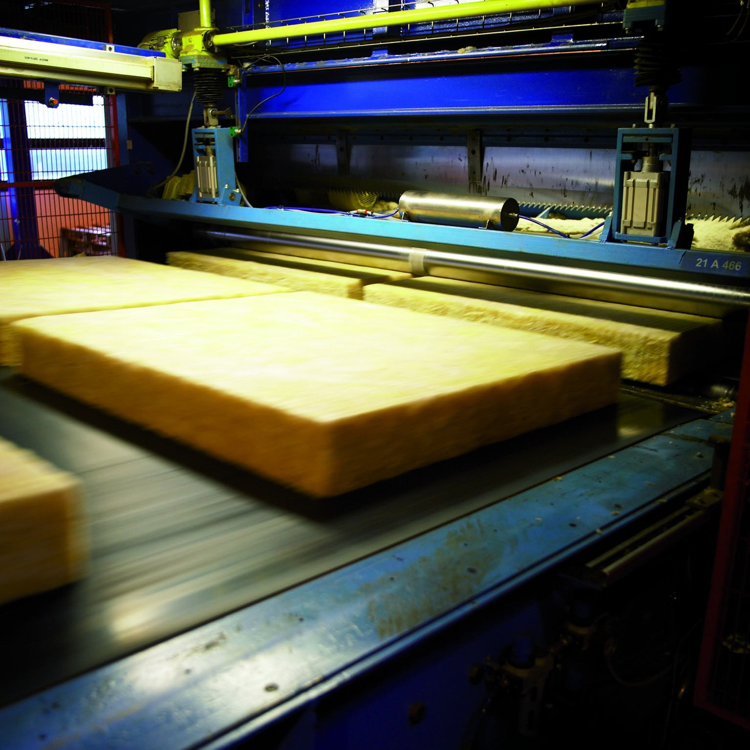 Produktion af formstykker på Isovers fabrik